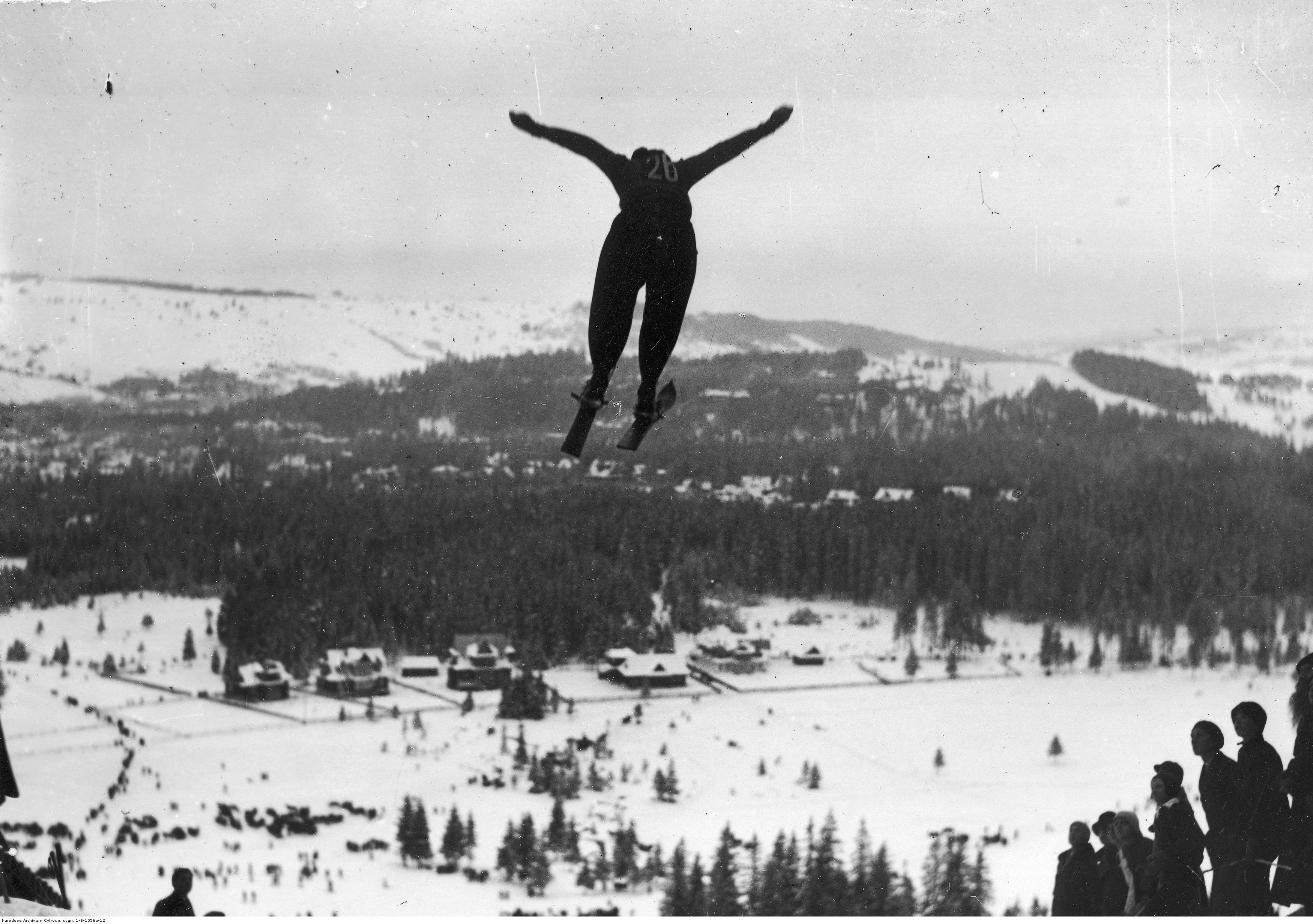 Jeden ze skoczków w trakcie lotu.